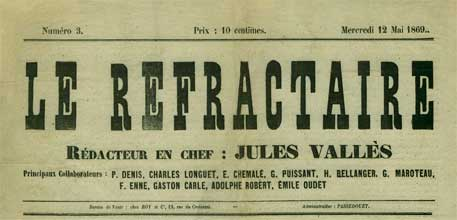 Le Réfractaire de Jules Vallès, numéro 3 du 12 mai 1869.